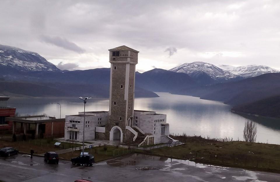 Nje pike strategjike e Monumentit te Kosovareve ku duket qarte dhe bukuria e Liqenit te Fierzes.